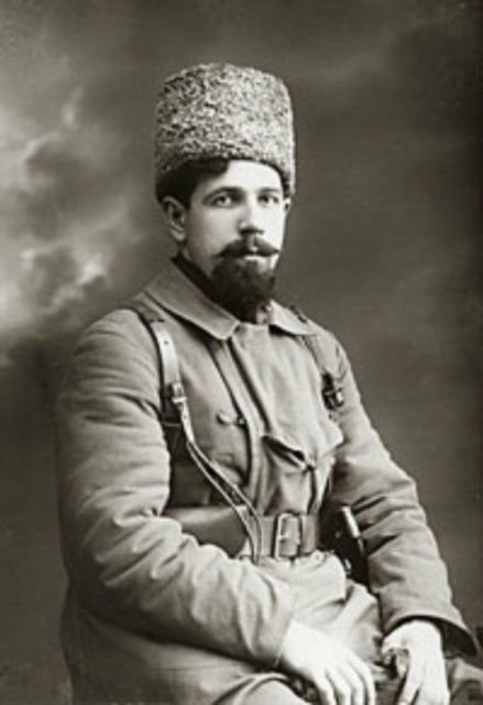 Pavel Dybenko (1889-1938)